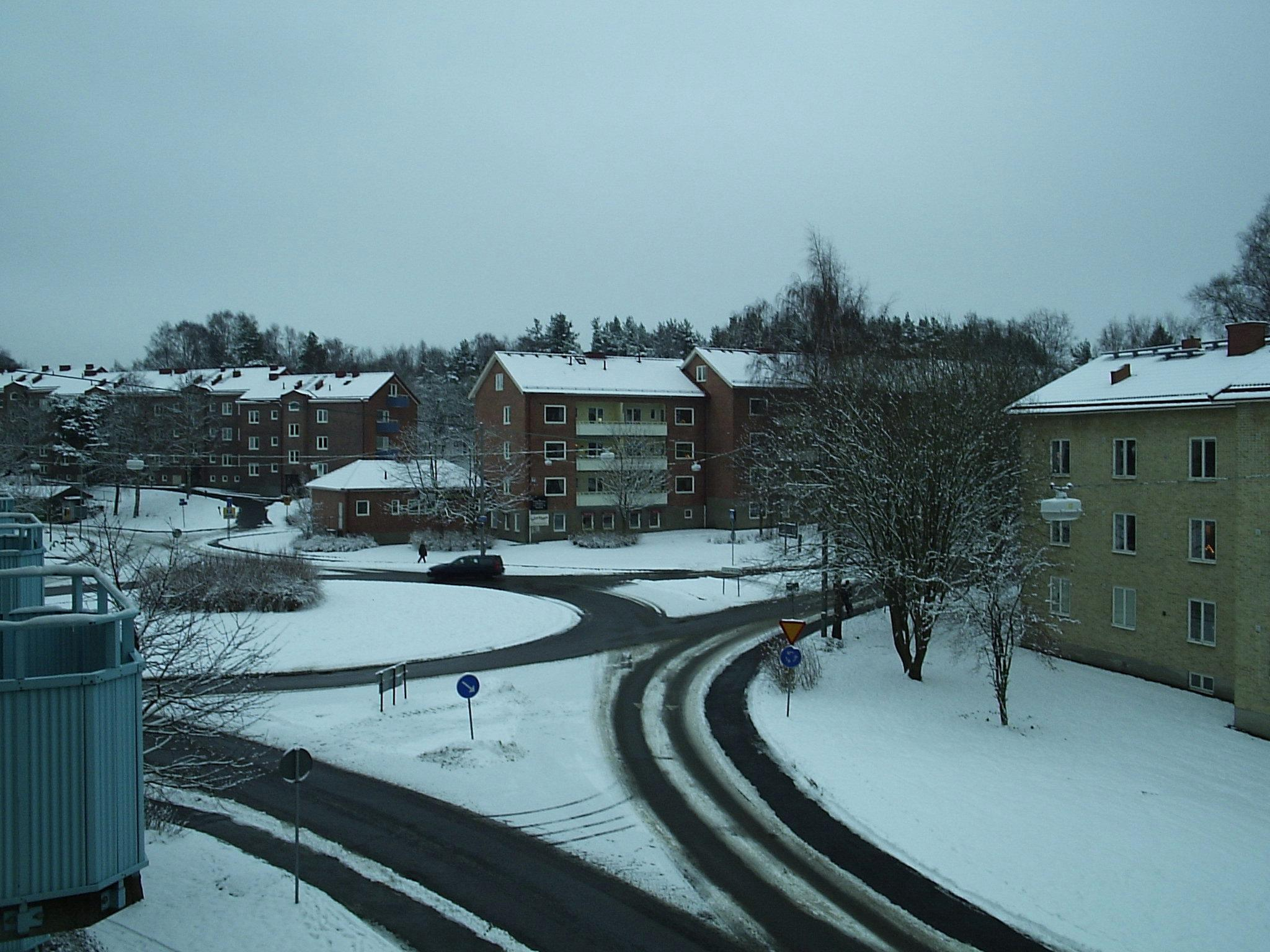 Rondellen som leder in till Petrifängsgatan i Kortedala, den 21 december 2004. En bild tagen av Harri Blomberg.